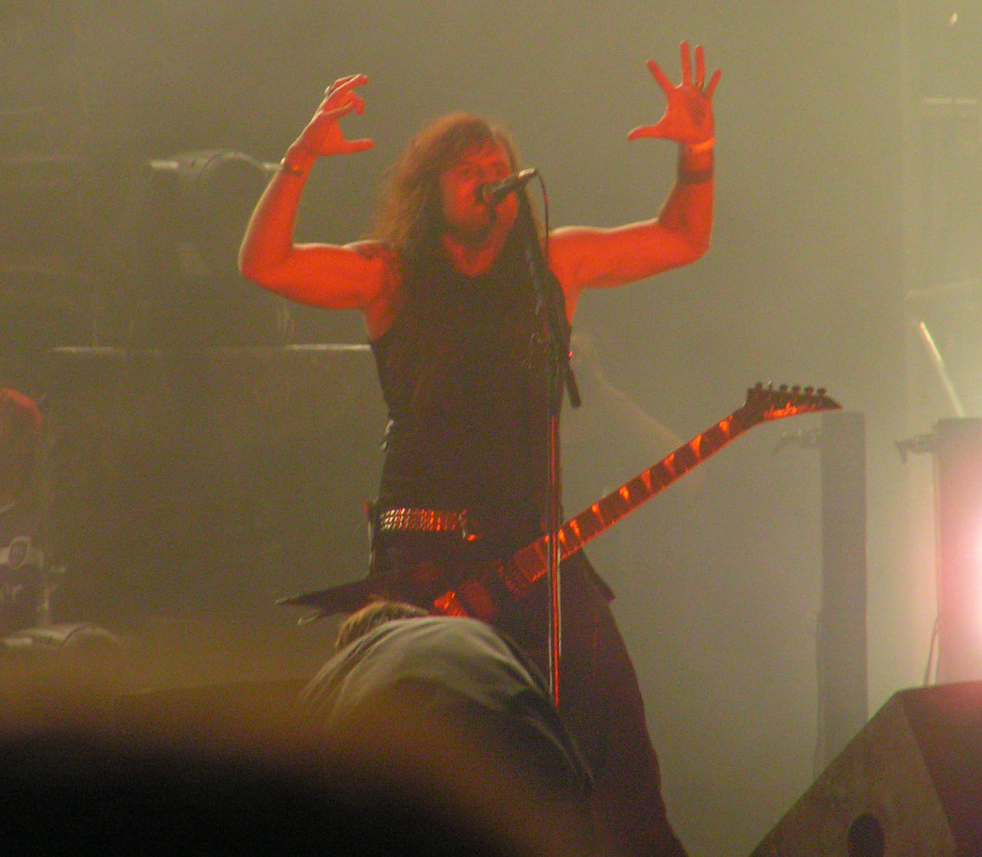 Kreator in concerto